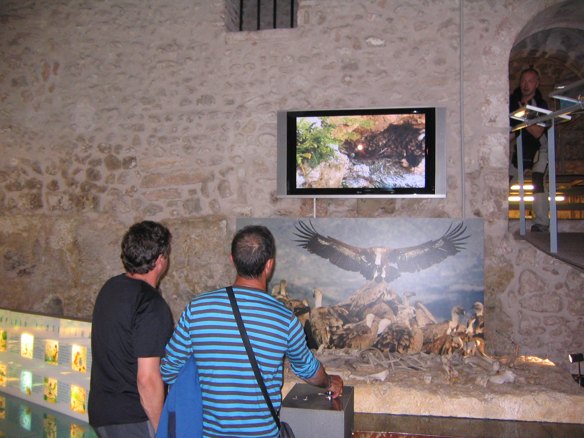 Iglesia de Santiago en Sepúlveda (Segovia, España), centro de interpretación del Parque Natural de las Hoces del Río Duratón.